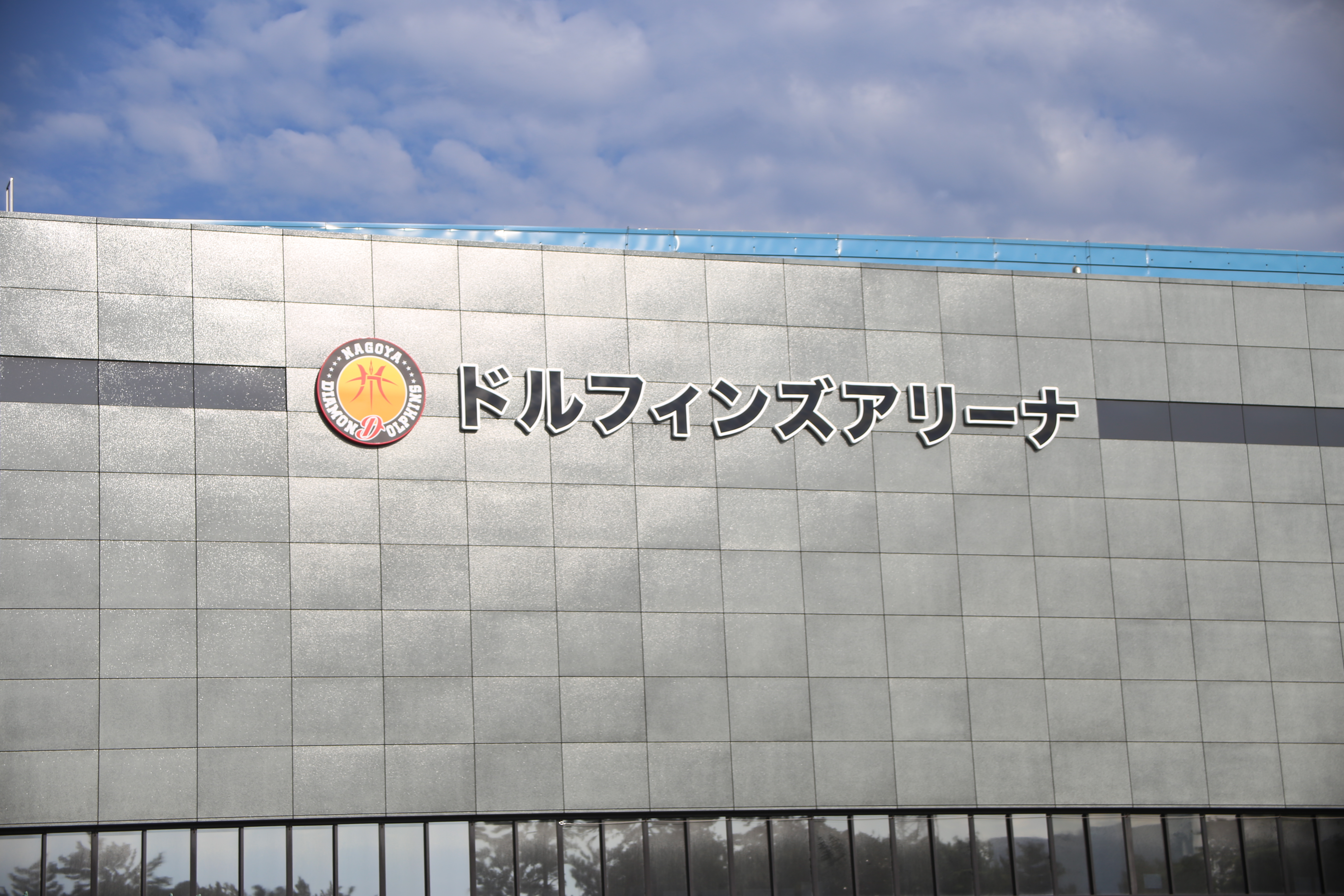 名古屋市中区二の丸の愛知県体育館（ドルフィンズアリーナ）